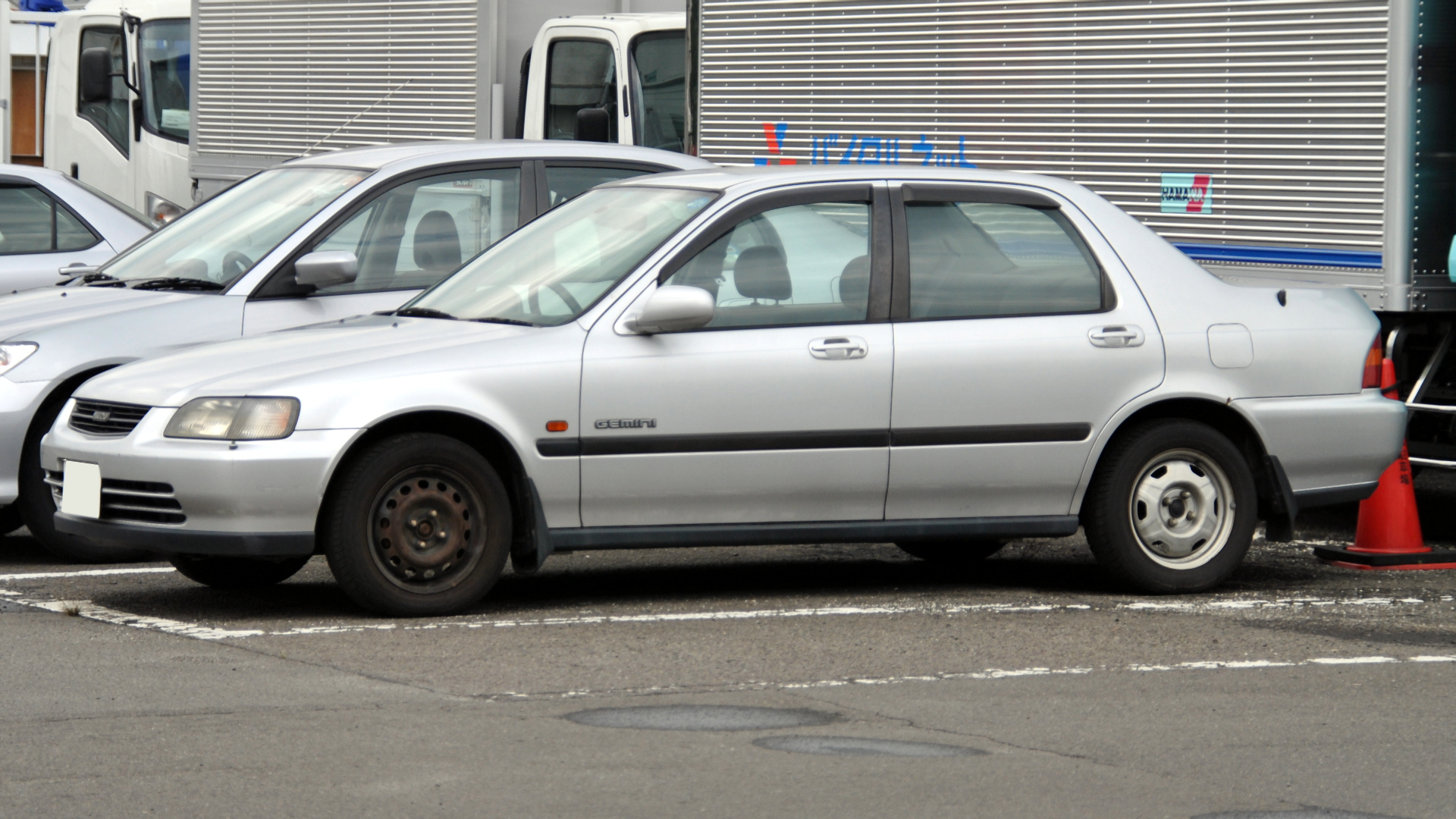 いすゞ・ジェミニ（4代目）